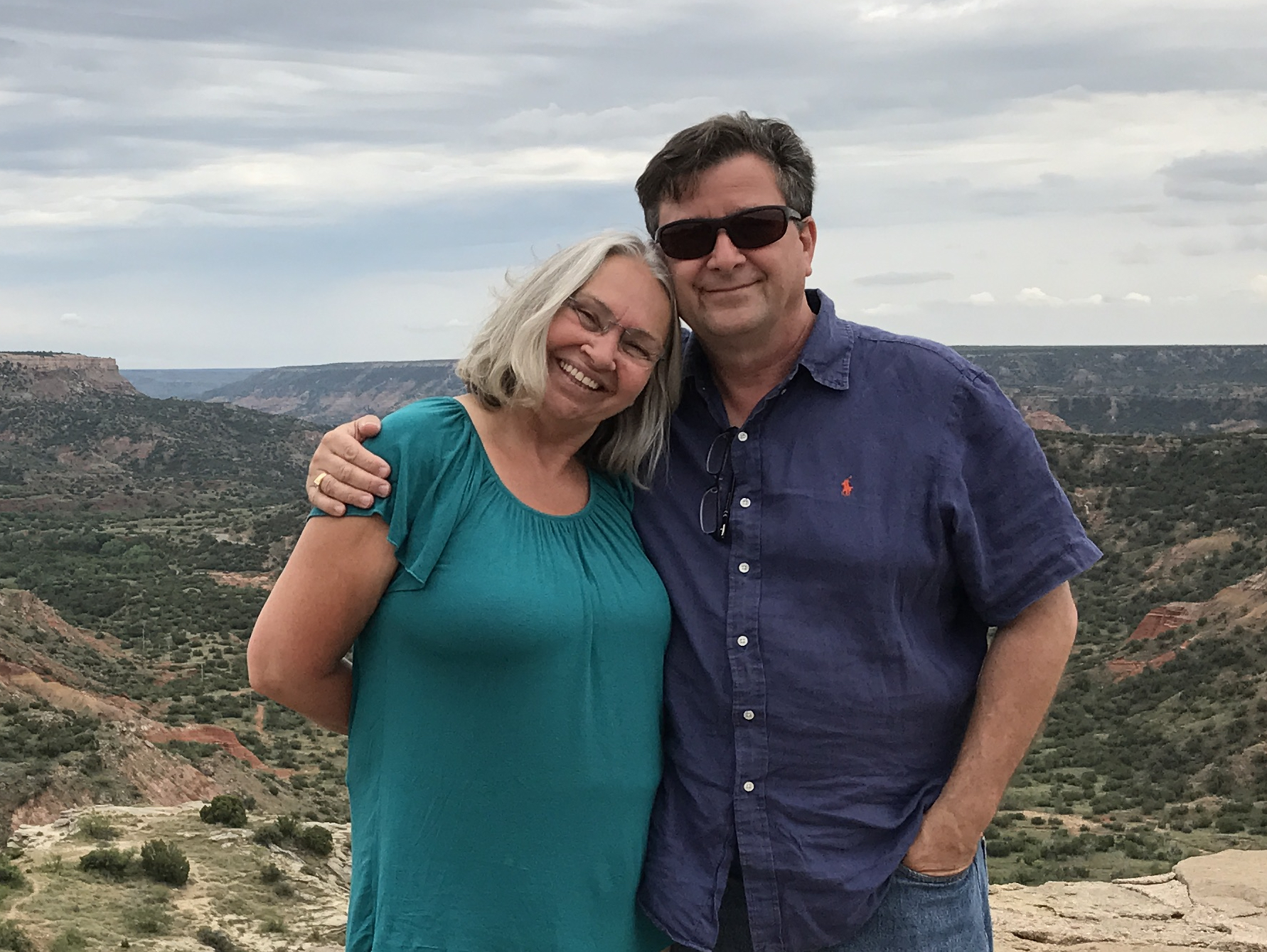 Philippe Porée-Kurrer et son épouse Marylis, Palo Duro Canyon, Texas, 31 juillet 2017